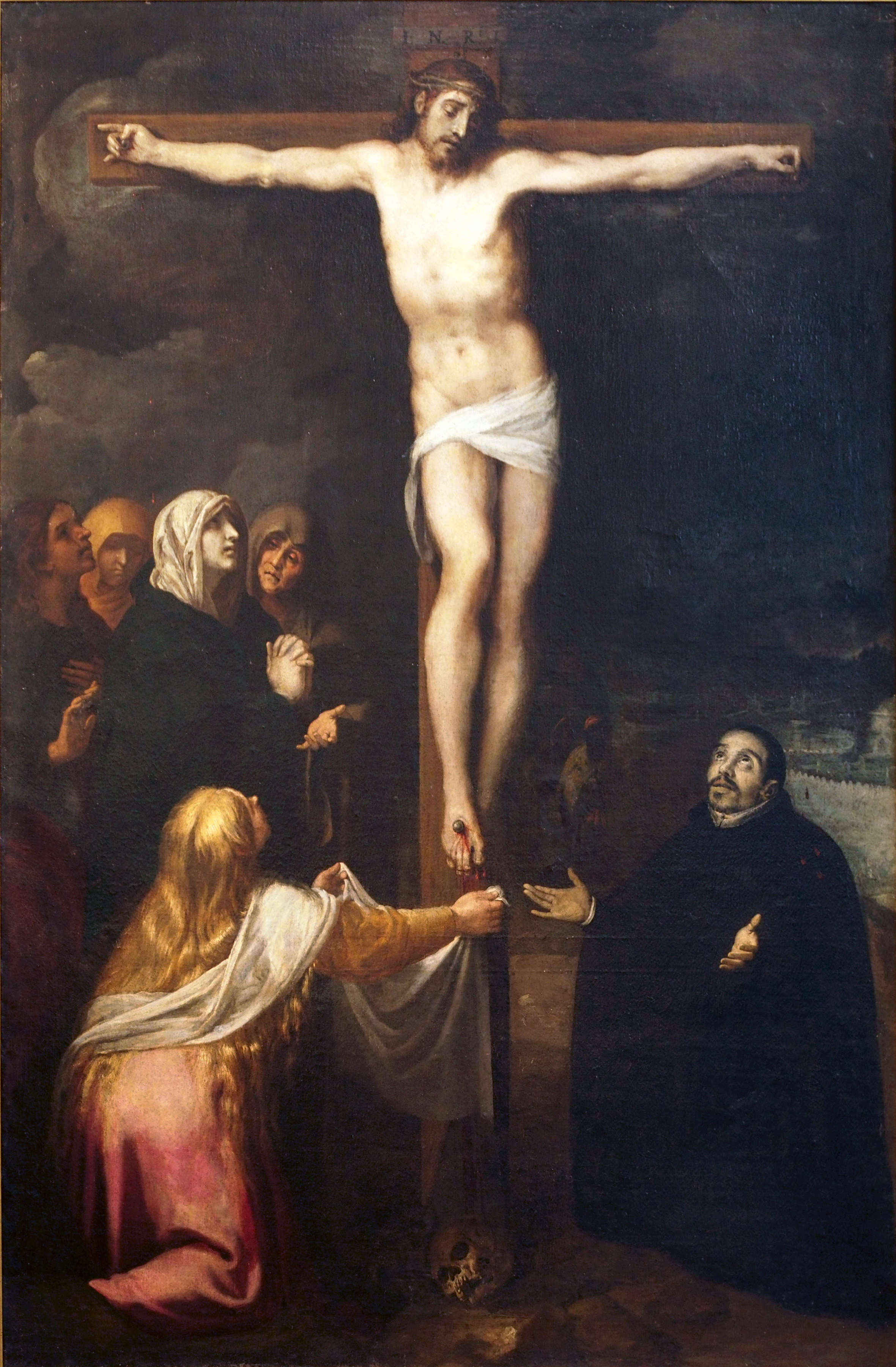 La obra representa al venerable sacerdote Francisco Jerónimo Simón contemplando a Cristo crucificado.